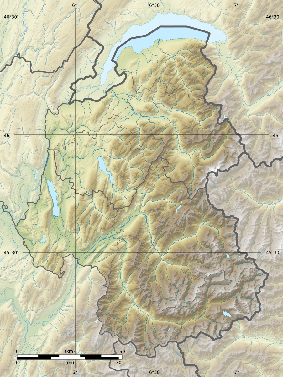 Carte physique vierge du Pays de Savoie, France, destinée à la géolocalisation. Limites géographiques de la carte : West: 5.534 E East: 7.259 E North: 46.59 N South: 44.97 N Projection equirectangulaire "Geoportail - France Metropolitaine" (IGNF:GEOPORTALFXX).